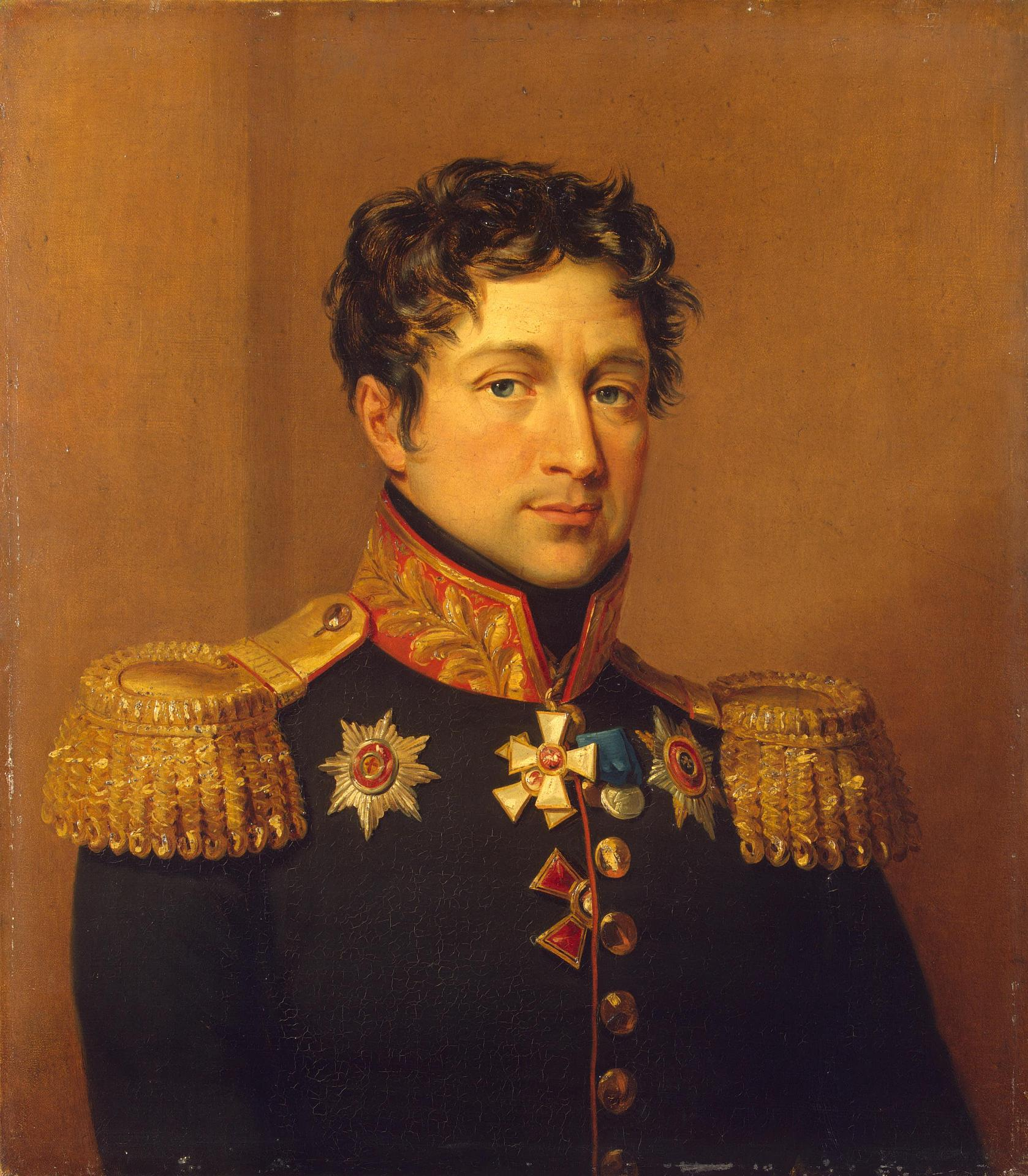 Zahar Dmitrievich Olsufjev 1-st (1773 – 1835), russian general